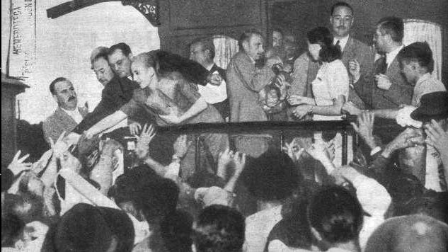 Eva Duarte (Evita). En el tren durante la campaña para las elecciones de 1946.